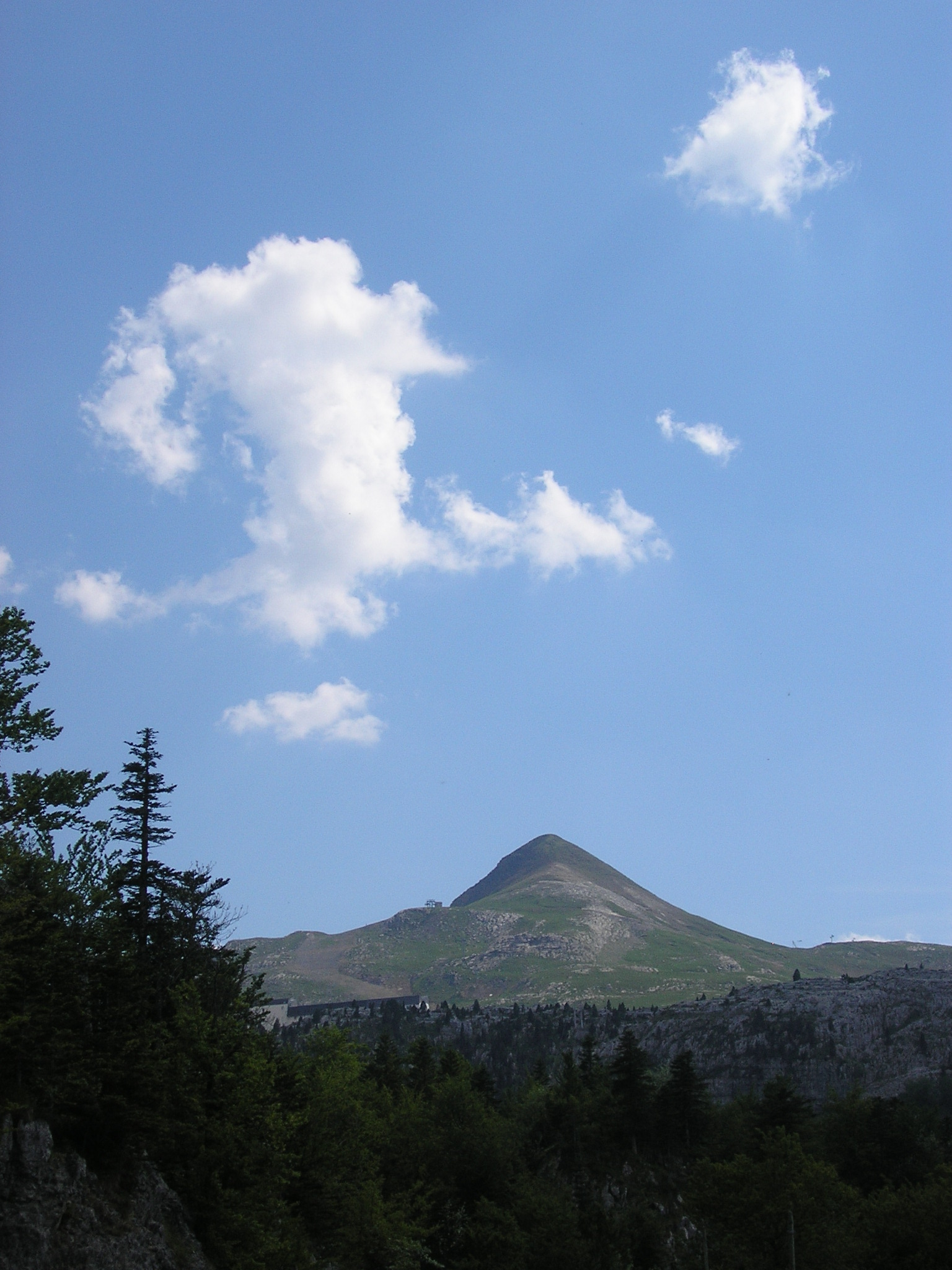 Пик Арлас (Пиренеи, Франция-Испания), вид с французской стороны